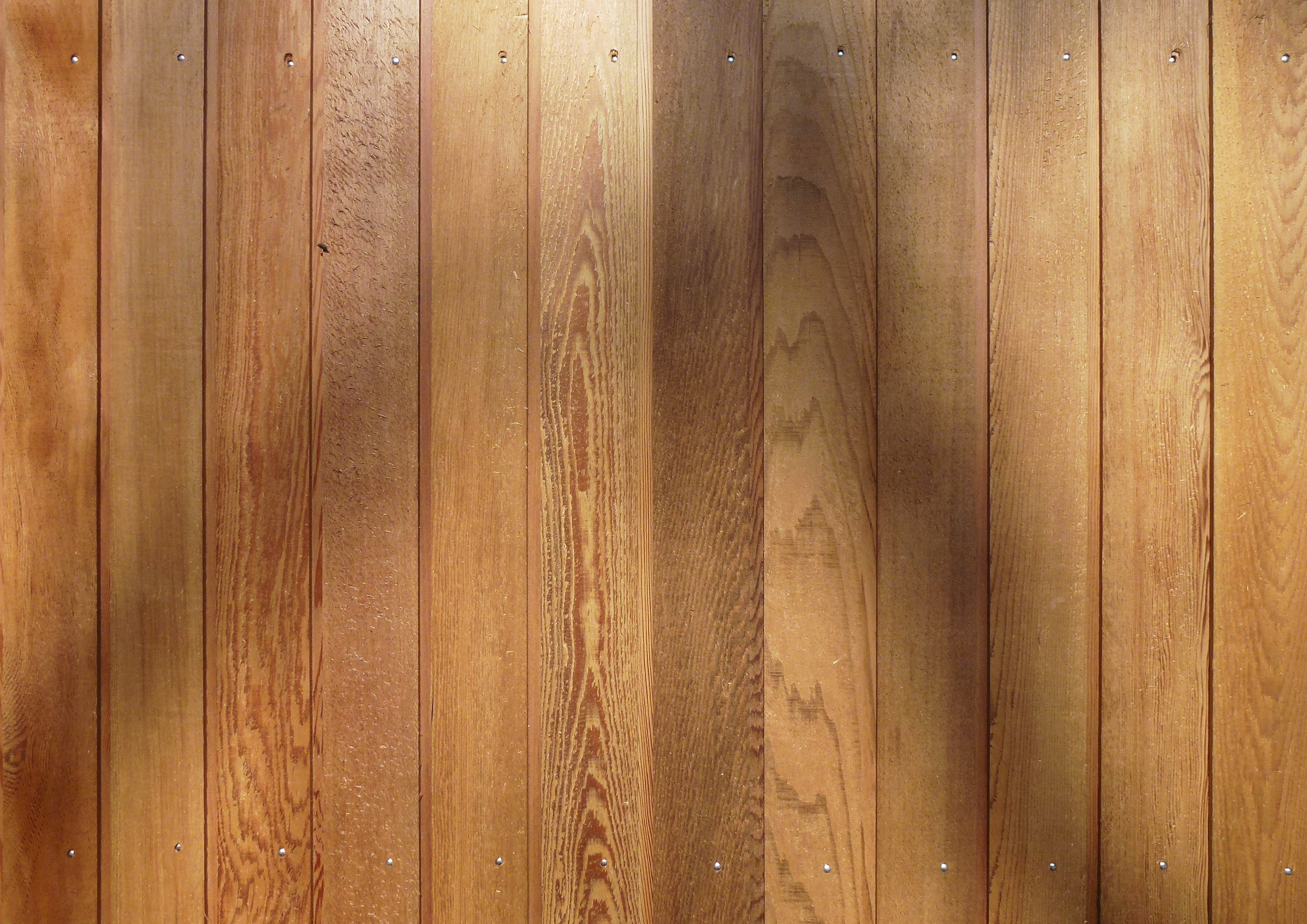 "Skagershuset", Skagersvägen 22-26, Årsta, Stockholms kommun, fasadpanel i cederträ